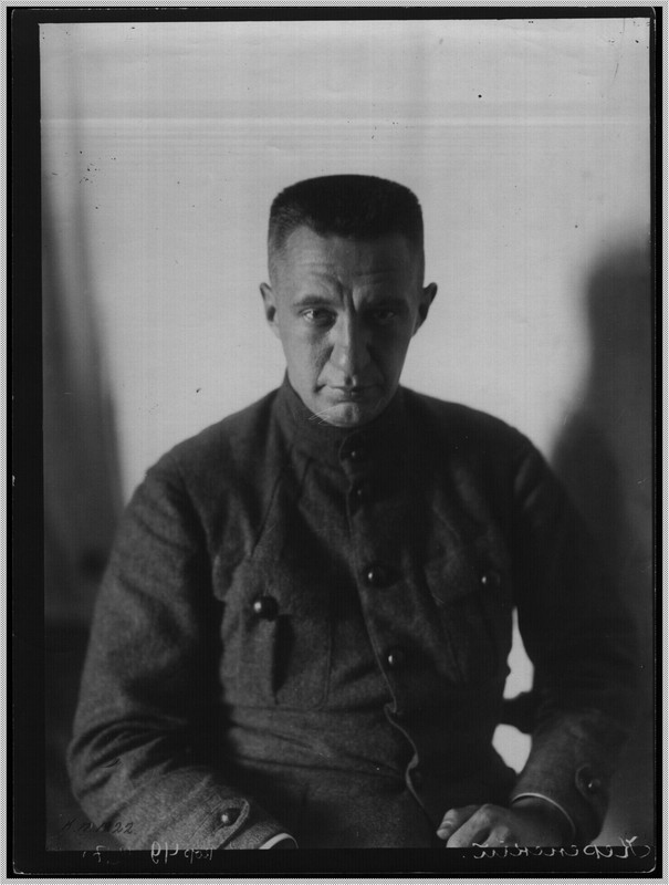 Керенский А.Ф. - министр и председ. Совета министров во Временном правительстве в 1917 г.